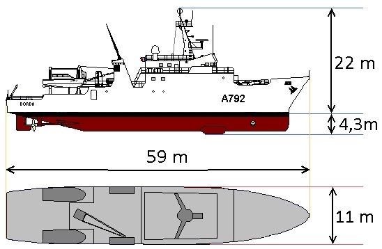 Image qui présente les principales dimensions du bâtiment hydrographique de 2ème classe Borda